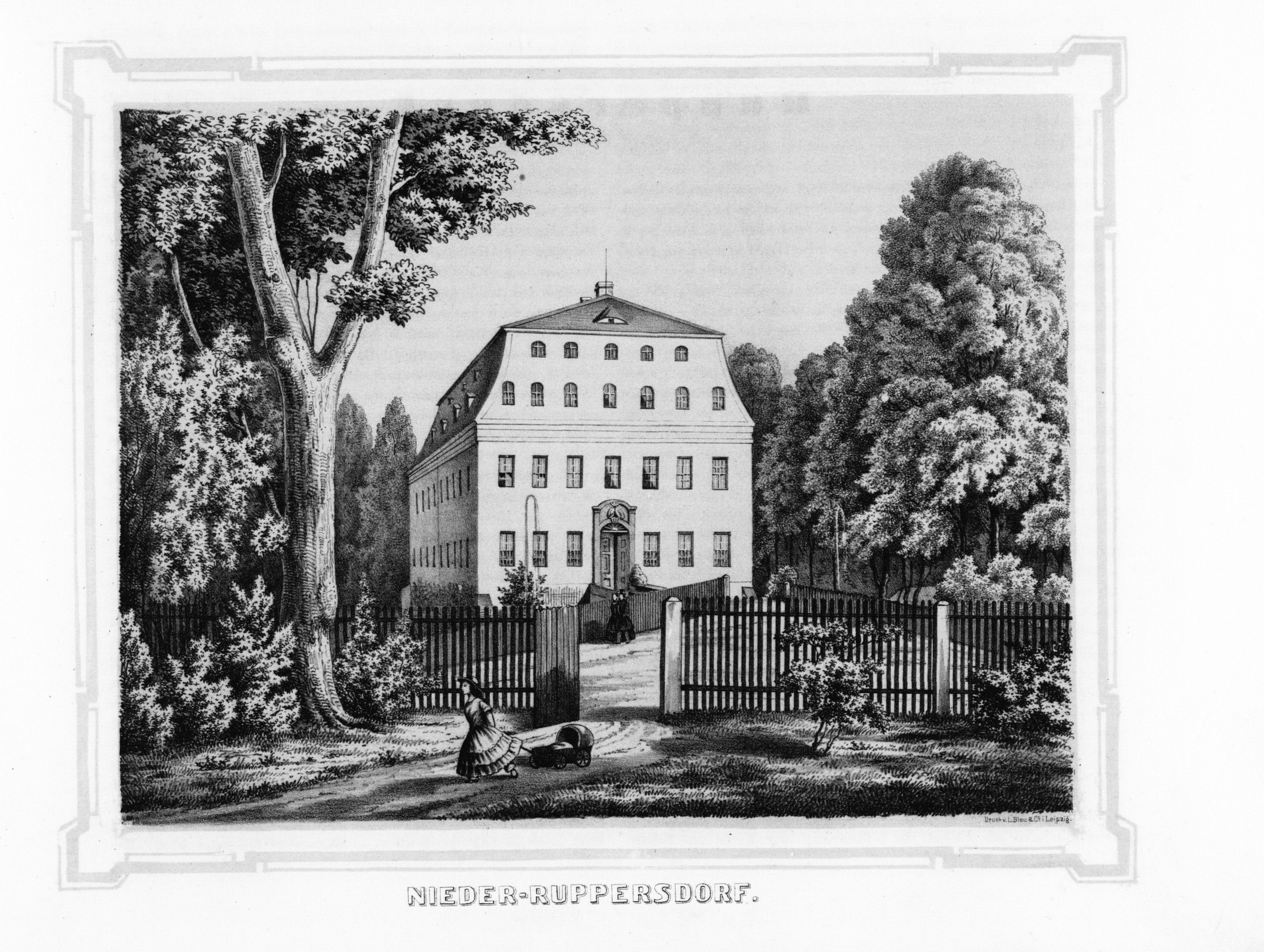 Nieder - Ruppersdorf aus: Album der Rittergüter und Schlösser im Königreiche Sachsen Markgrafenthum Oberlausitz Section: III